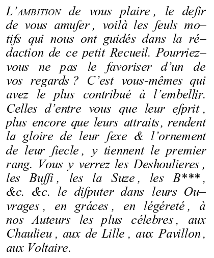 Extrait de l'épître dédicatoire du Calendrier de Paphos de Voltaire (édition de 1778). Typographie, présentation et orthographe originelles respectées.